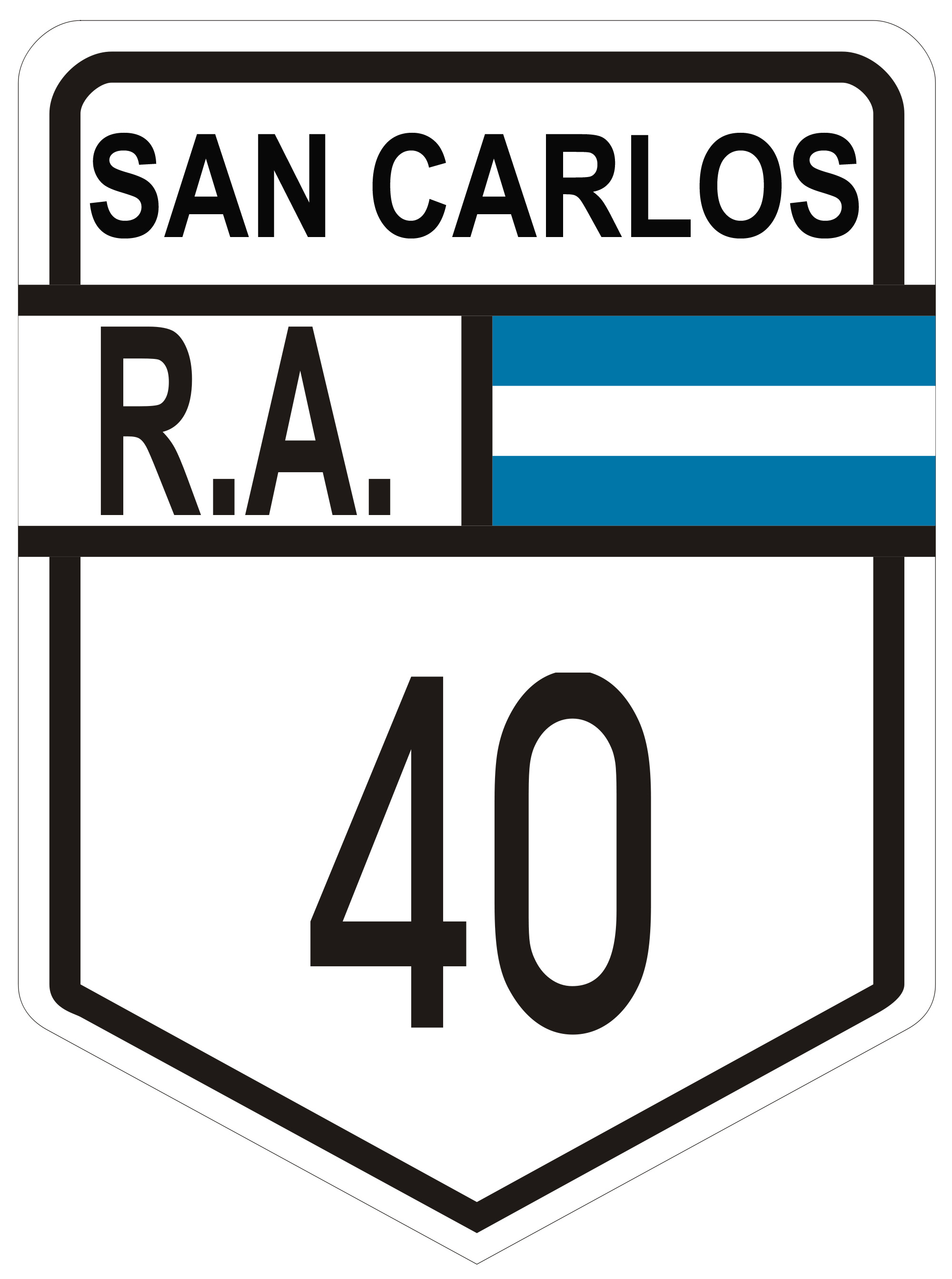 San Carlos - RN40